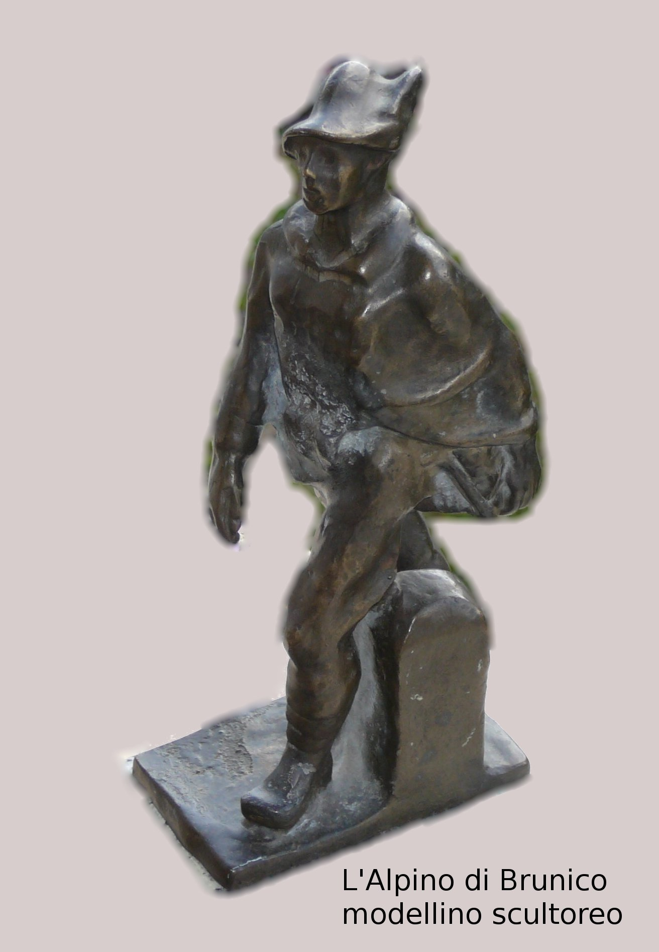 Modellino dell'Alpino di Brunico